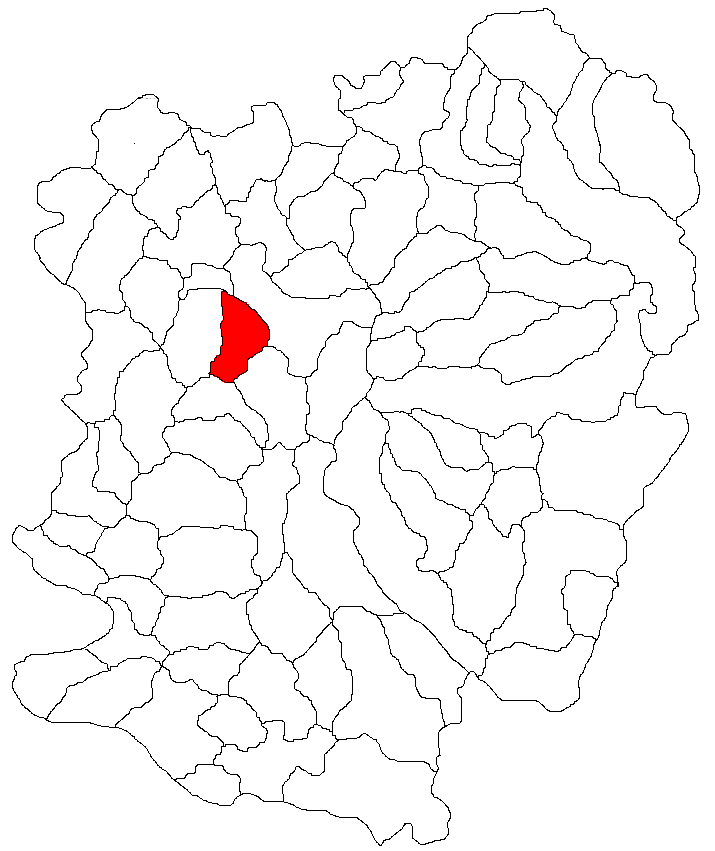 Categorie:Hărţi ale judeţului Caraş-Severin